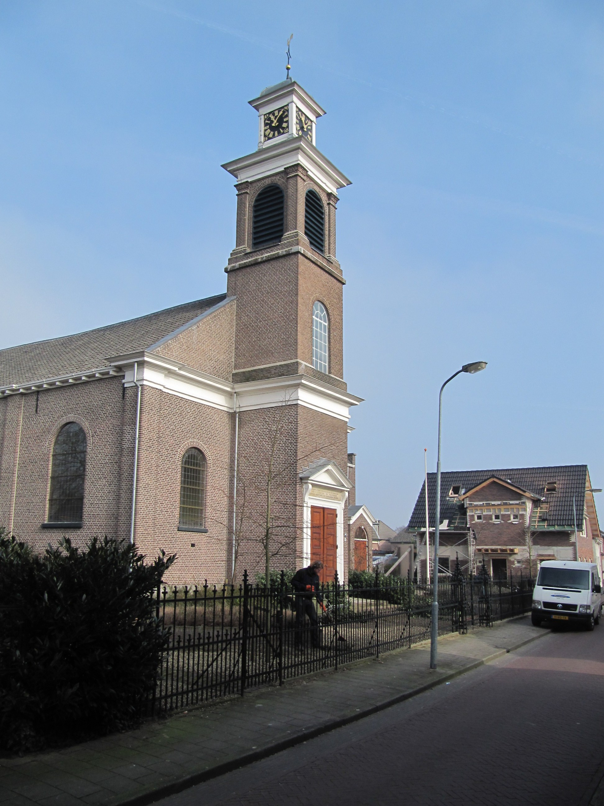 RM42121 Dieren - Kerkstraat 41.jpg